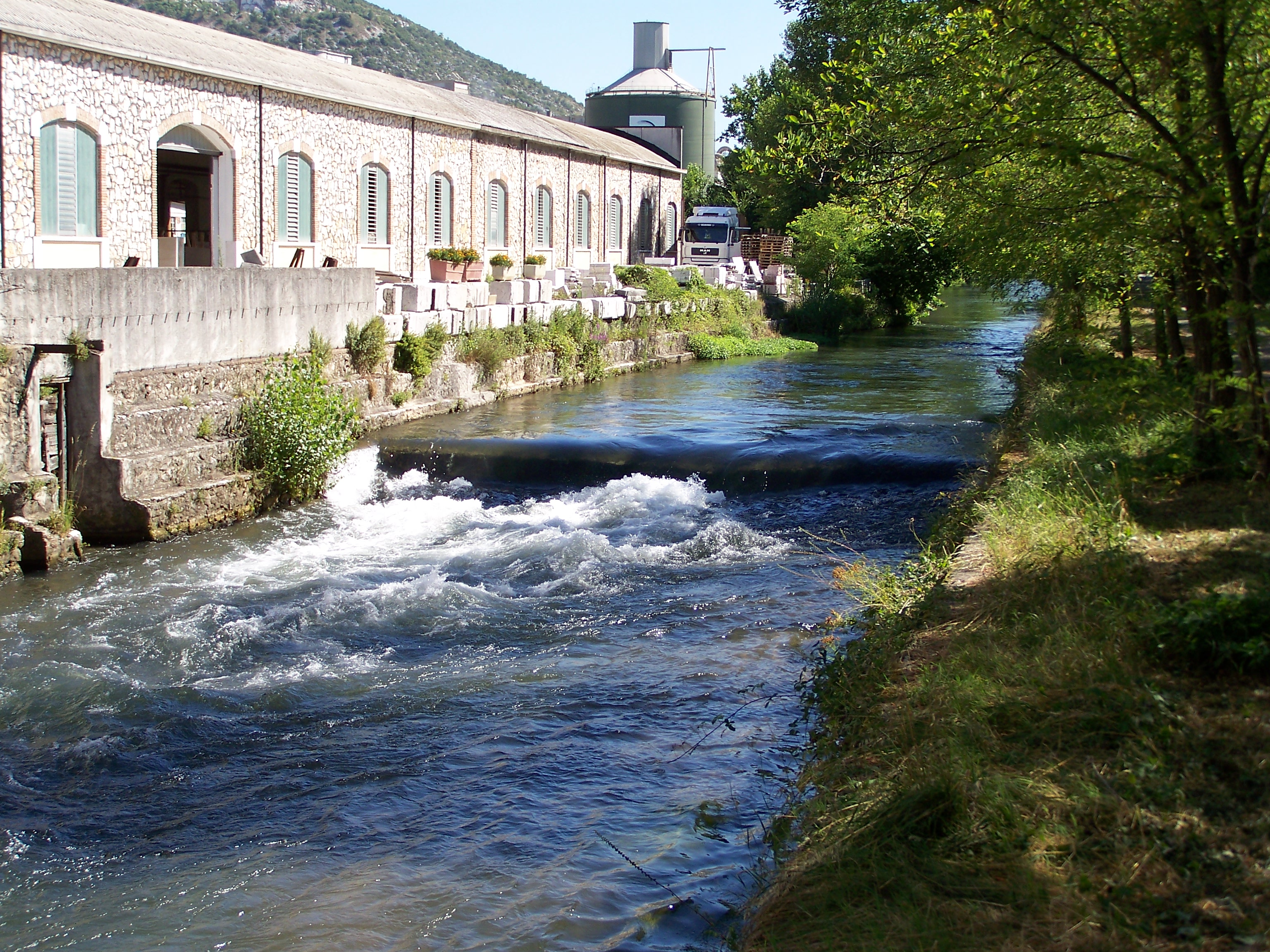 Breve salto del Naviglio Grande Bresciano nei pressi di Virle.